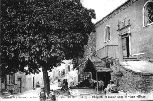 Chapelle Notre-Dame, Anjou, Isère, France. Carte postale ancienne.